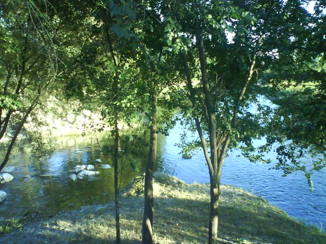 Desembocadura del arroyo de la Gavia en el río Manzanares